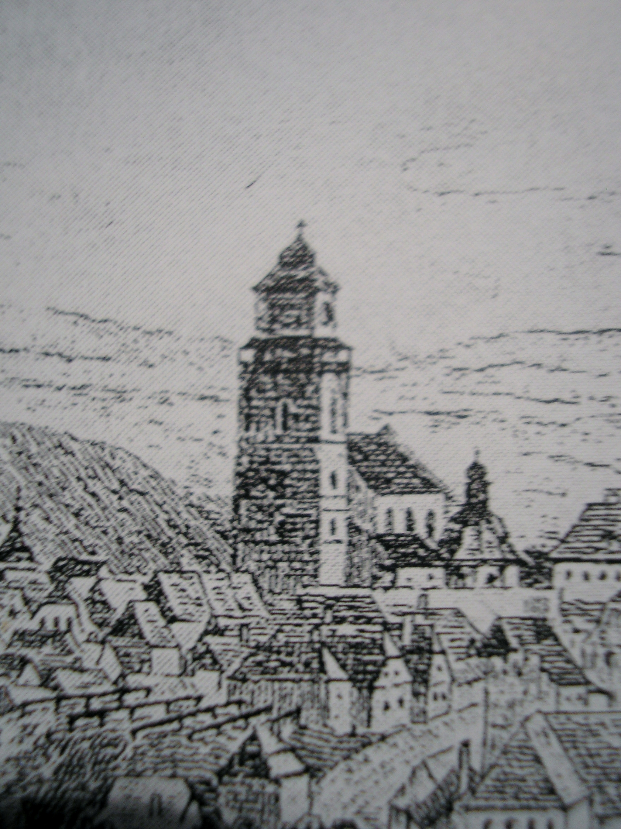 Mětská věž v Třebíči v detailu rytiny města okolo roku 1830